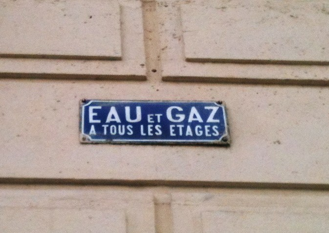 « Eau et gaz à tous les étages », plaque émaillée sur la façade d'un immeuble parisien (6e arrondissement).